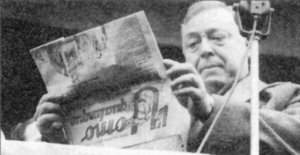 Guglielmo Giannini leader del Fronte dell'Uomo Qualunque